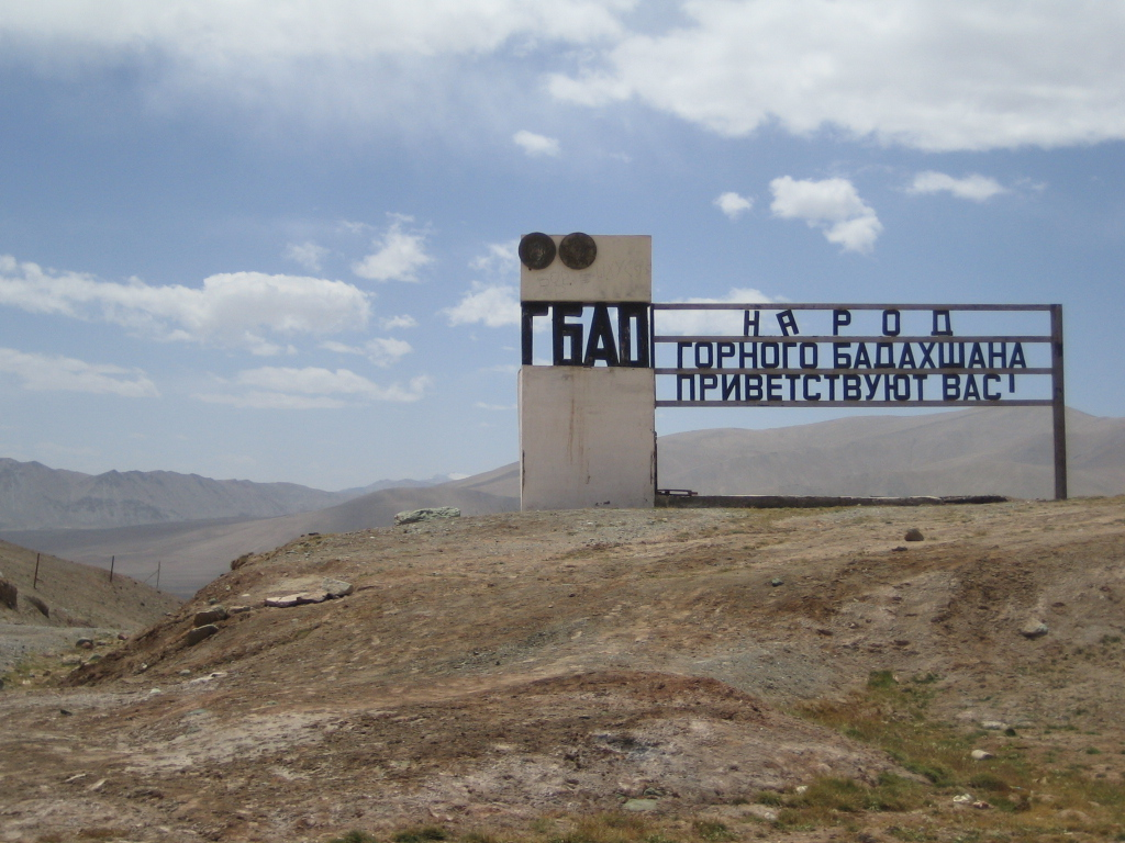 Фотография знака возле Памирского тракта на въезде в Горный Бадахшан